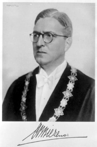 C.B. Biezeno, Rector magnificus 1937-1938 en 1949-1951